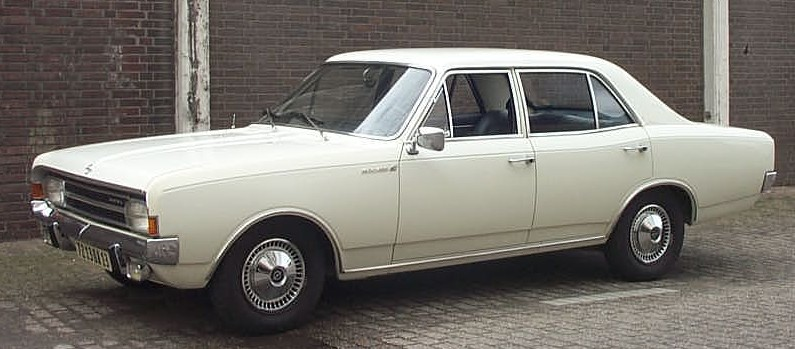 Opel Rekord C 1900L 1967